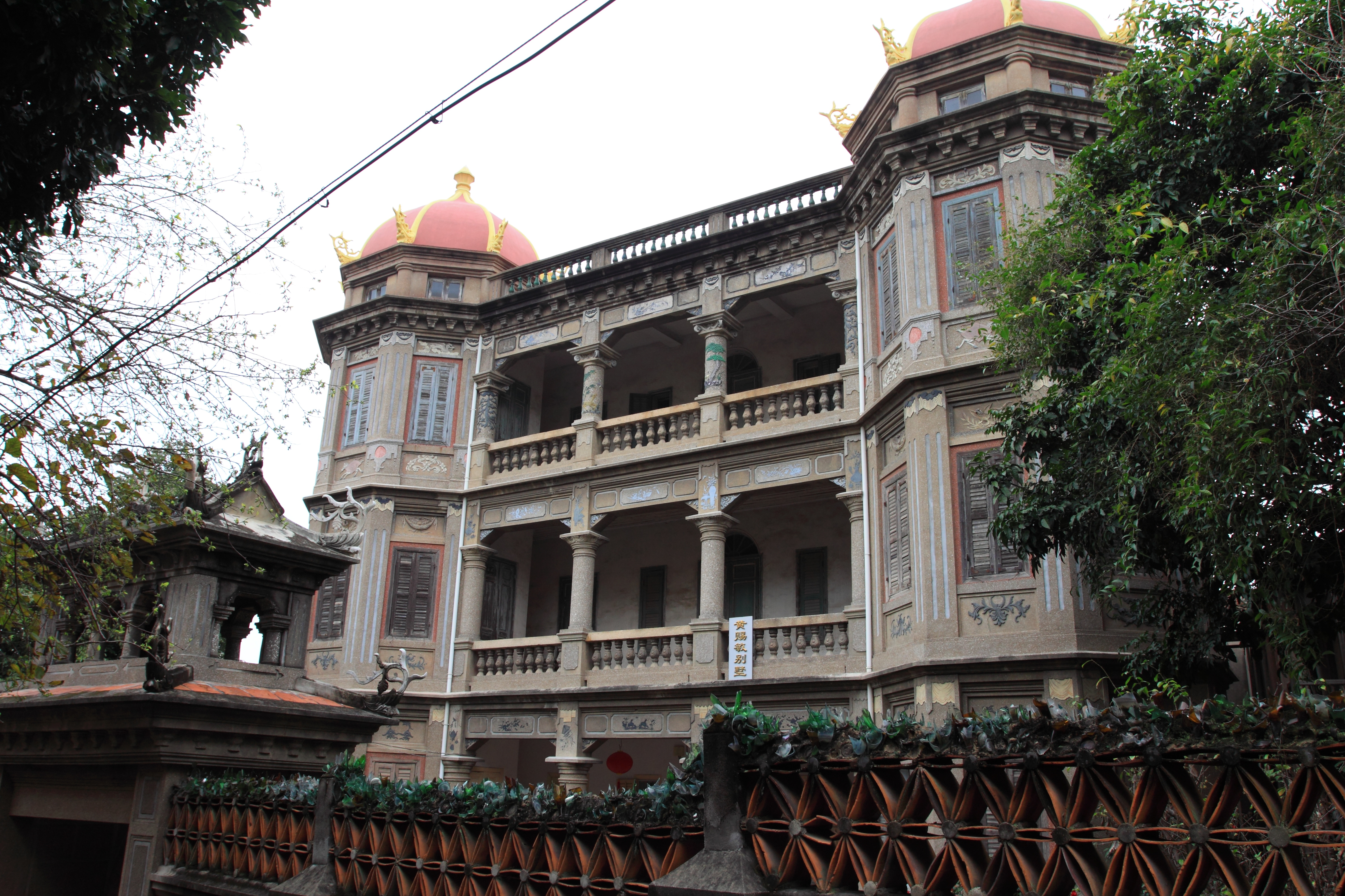 鼓浪屿黄赐敏别墅，位于中国福建省厦门市。